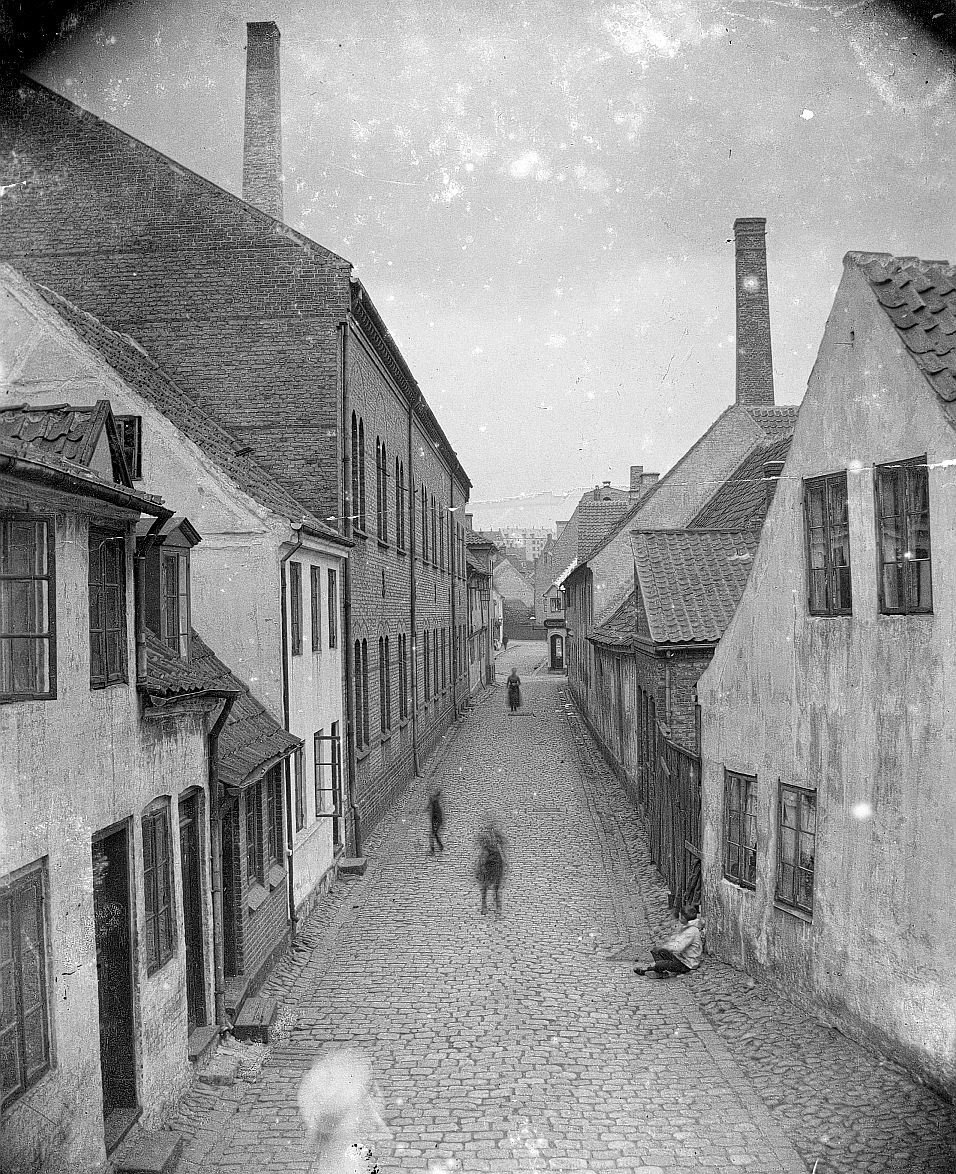 Grønnegade Aarhus 1898